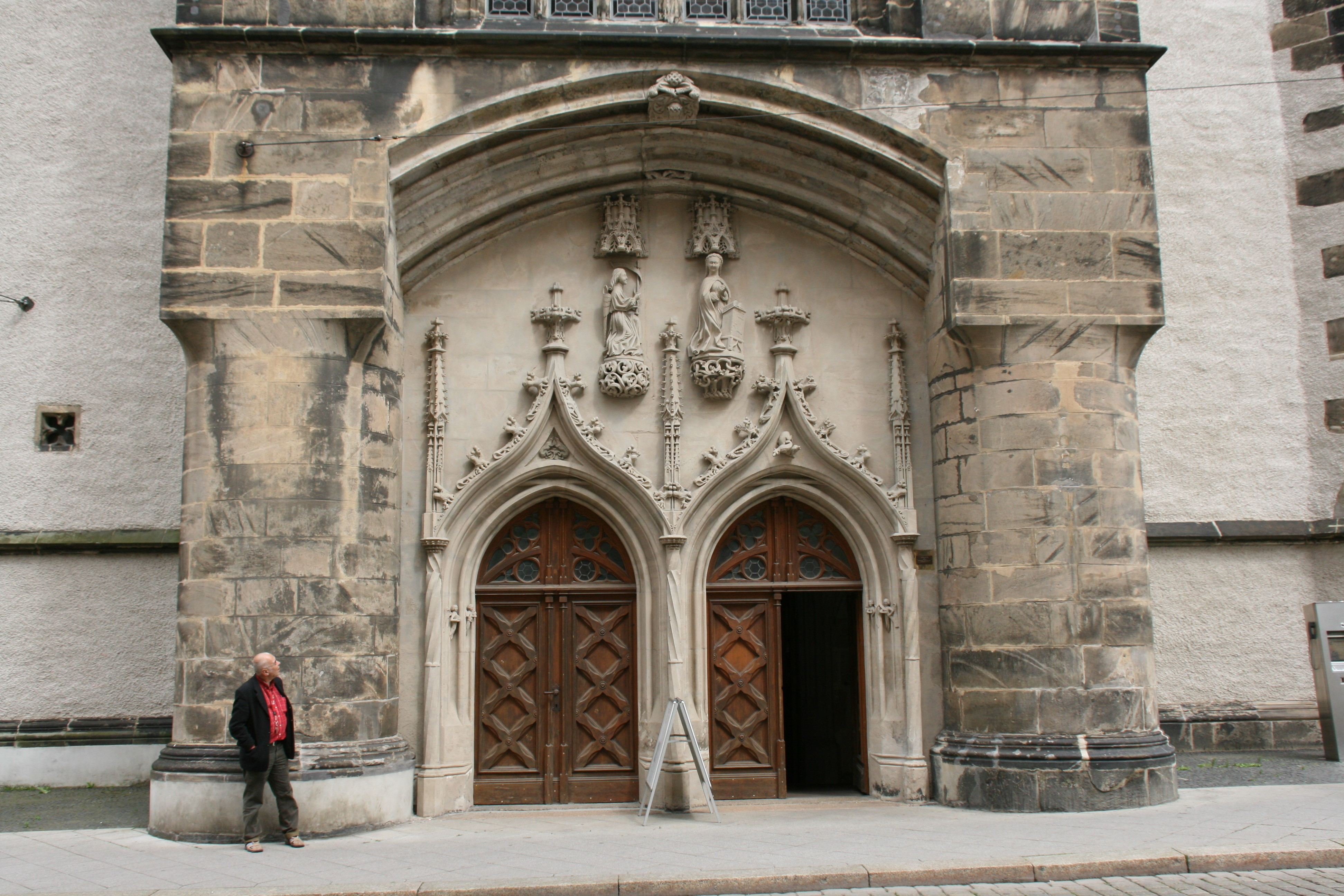 Frauenkirche, An der Frauenkirche in Görlitz